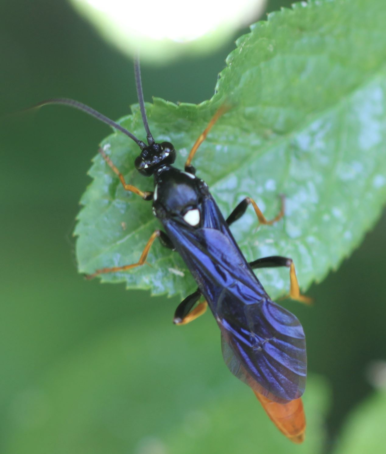 Schlupfwespe Amblyjoppa fuscipennis, Männchen, am 3. Juni 2019 in Walldorf/Baden